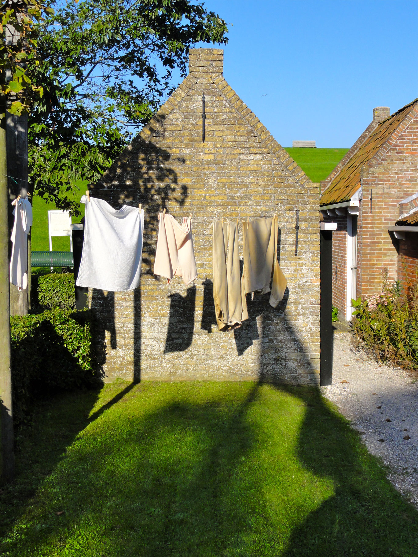 Boethuisje aan De Oere in Moddergat